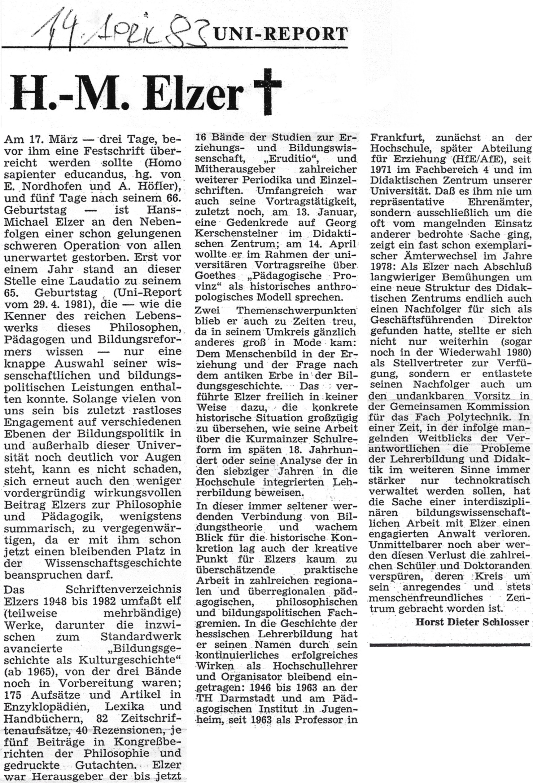 Nachruf auf Hans-Michael Elzer von Host Dieter Schlosser aus dem Uni-Report 4/1983 (Goethe-Universität Frankfurt am Main)